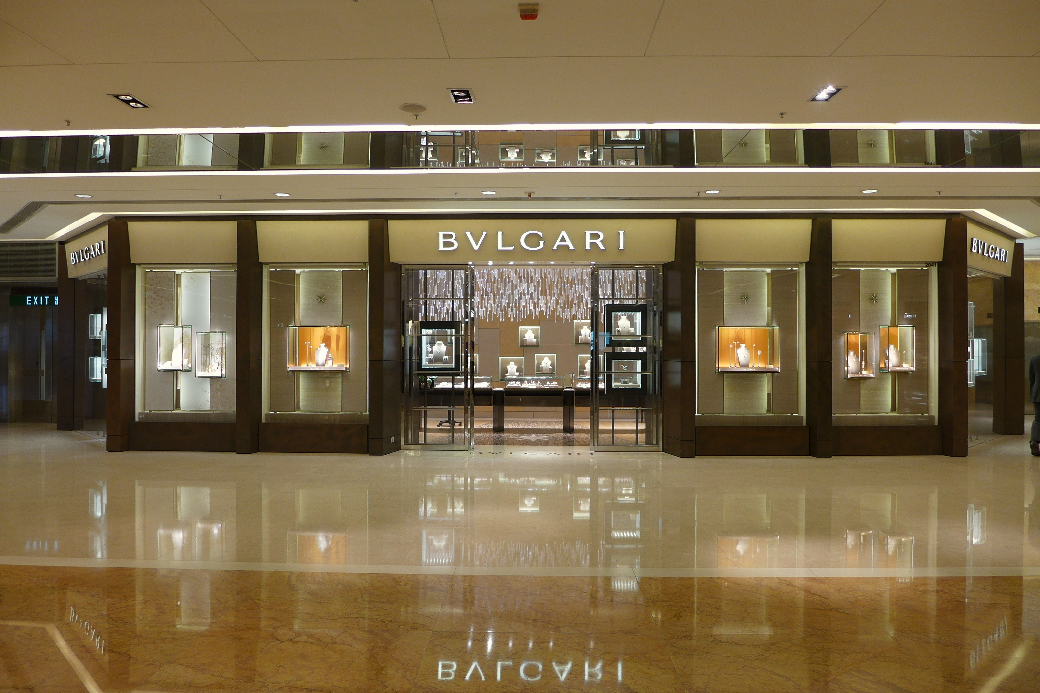 BVLGARI in ifc mall, Hong Kong